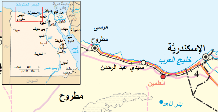 خارطة لِموقع مدينة العلمين، في مصر.